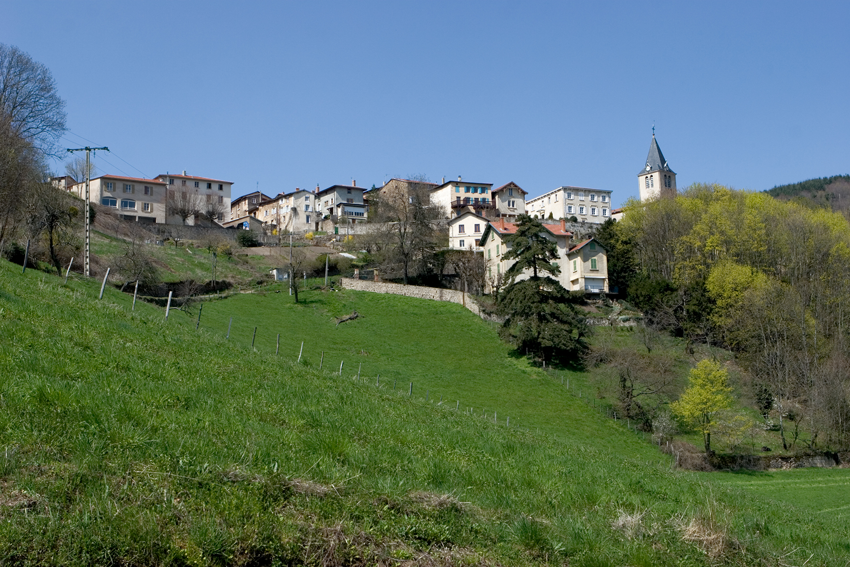 Yzeron, France.